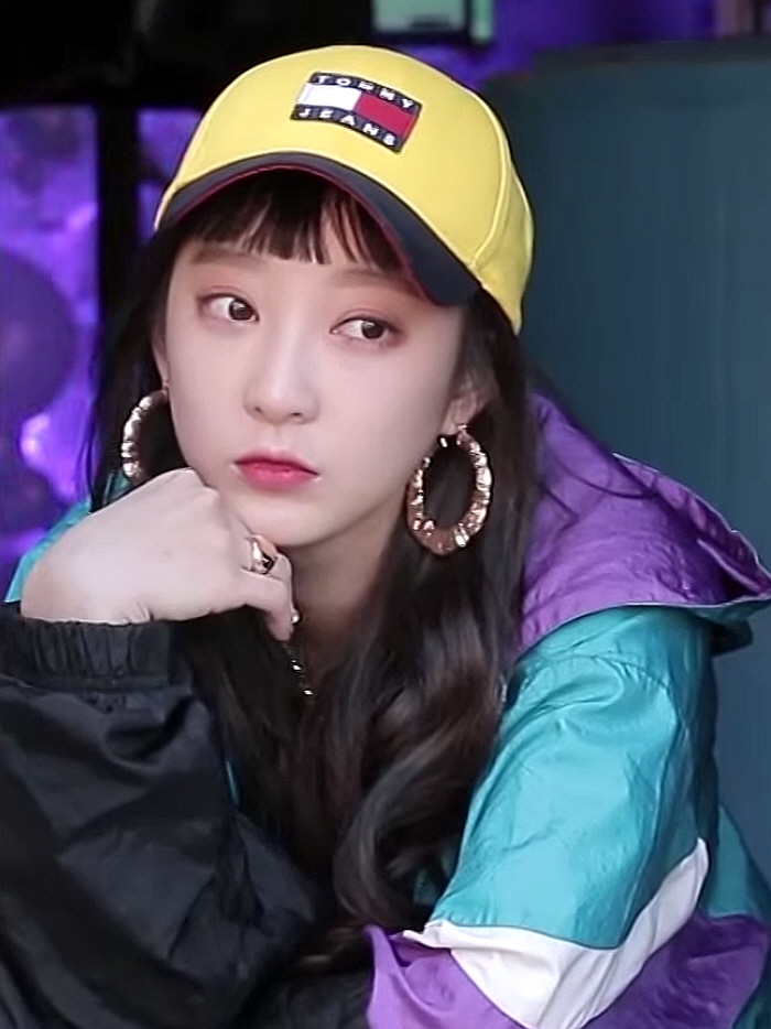 EXID 새 싱글 '내일해'···뮤직비디오 비하인드 영상 (4)